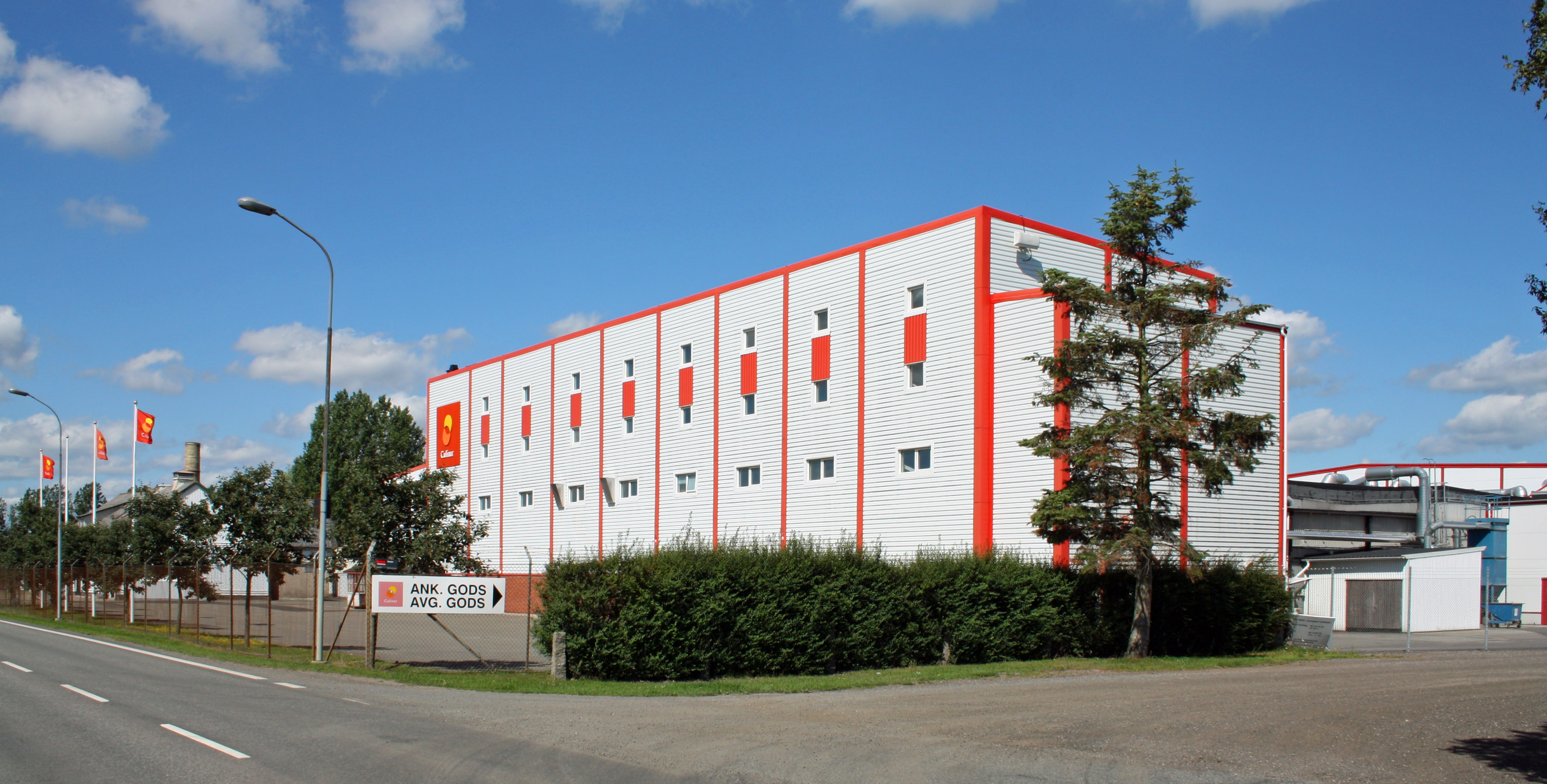 Culinars fabriksanläggning i Fjälkinge, den 4 augusti 2012.